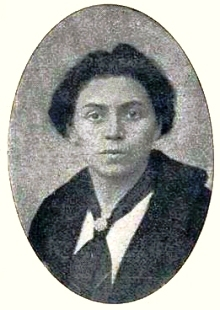 Hélène Brion (1882 - 1962) est une institutrice, féministe, syndicaliste CGT et pacifiste, auteur de La Voie féministe.